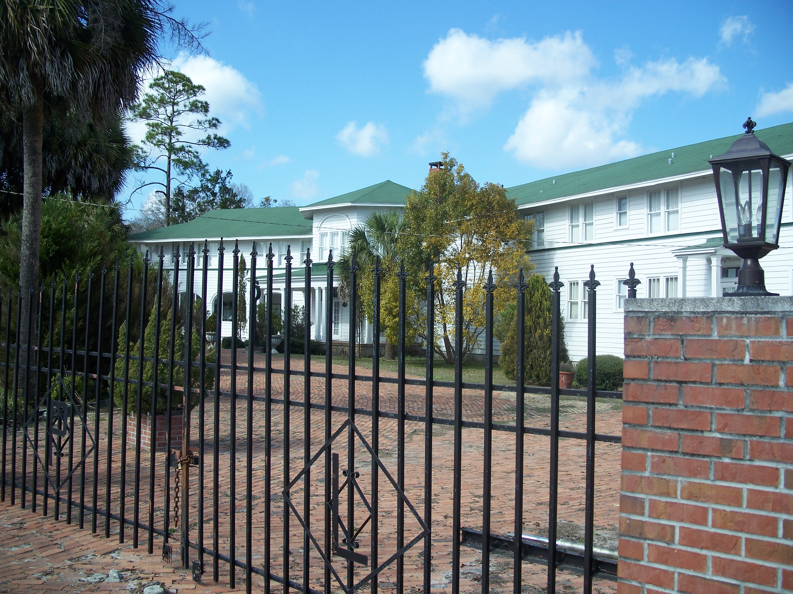 Shamrock, Florida: Putnam Lodge